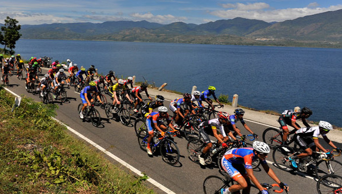 Tds lewati danau